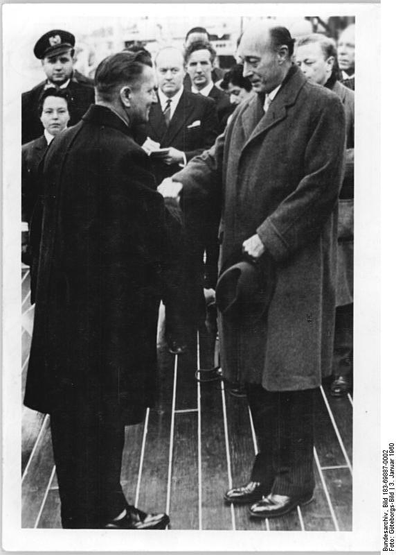 Zentralbild Göteborgs-Bild-Telefoto-3.1.1960 Erstes DDR Urlauberschiff übergeben. Am 3.1.1960 wurde in Göteborg das erste FDGB Urlauberschiff, die ehemalige "Stockholm" übergeben. Es erhielt den Namen "Völkerfreundschaft". UBz: Der Direktor der Schwedischen Amerika-Linie, Erik Wijk (rechts) bei der Übergabe an den Sekretär des FDGB, Kurt Meier.